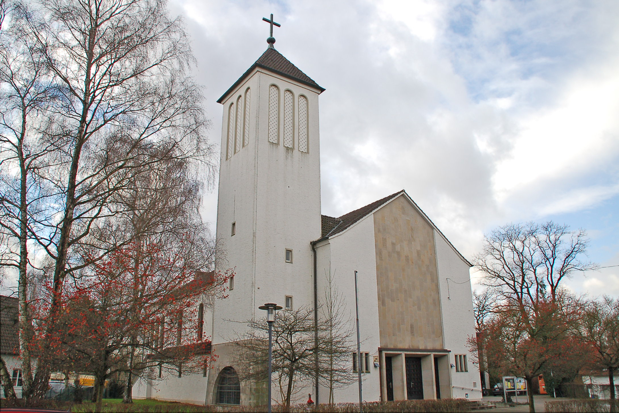 Außenaufnahme St.Hedwig-Heepen